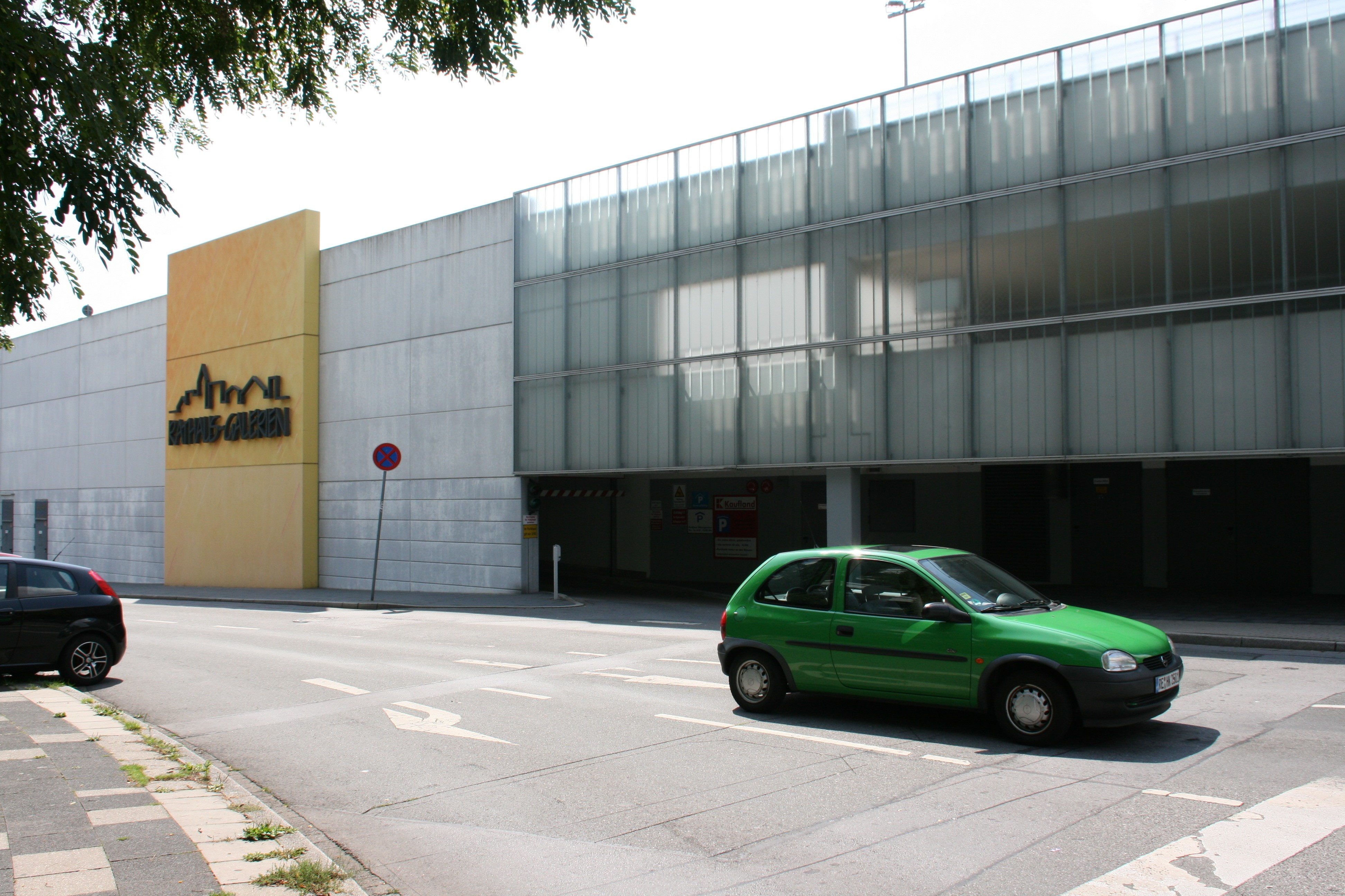 Rathaus-Galerien, Blumenstraße in Herten